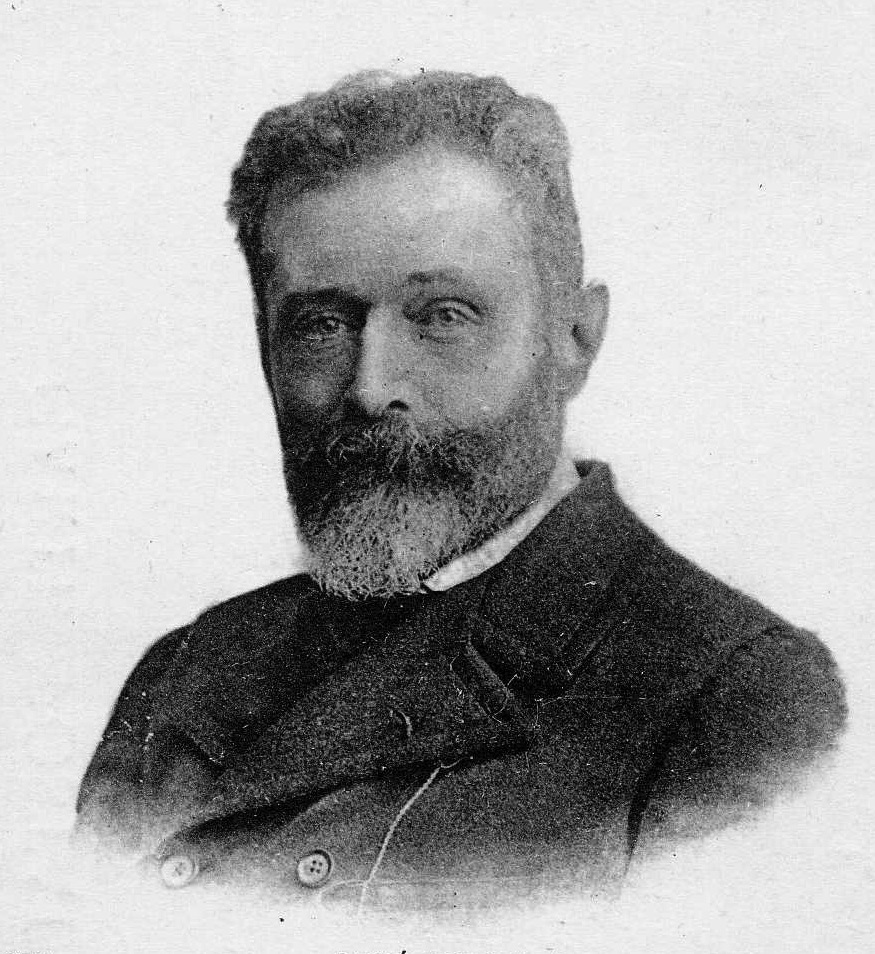 Portrait de René Kerviler (1842-1907), historien. Carte postale F. Château, conservée aux Archives de Rennes, 100 Fi 456